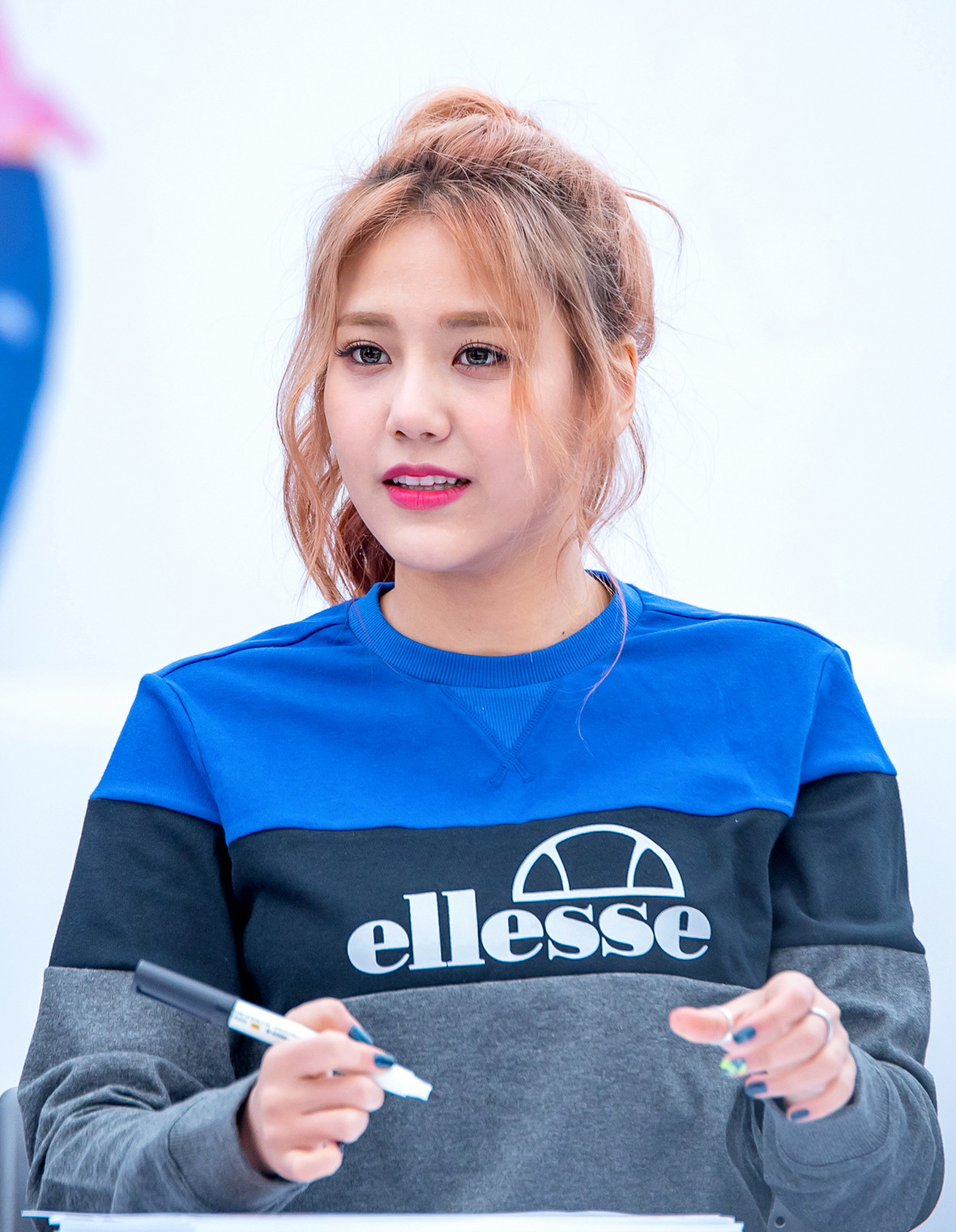 [16.04.08] AOA 엘레쎄 수원 팬싸인회